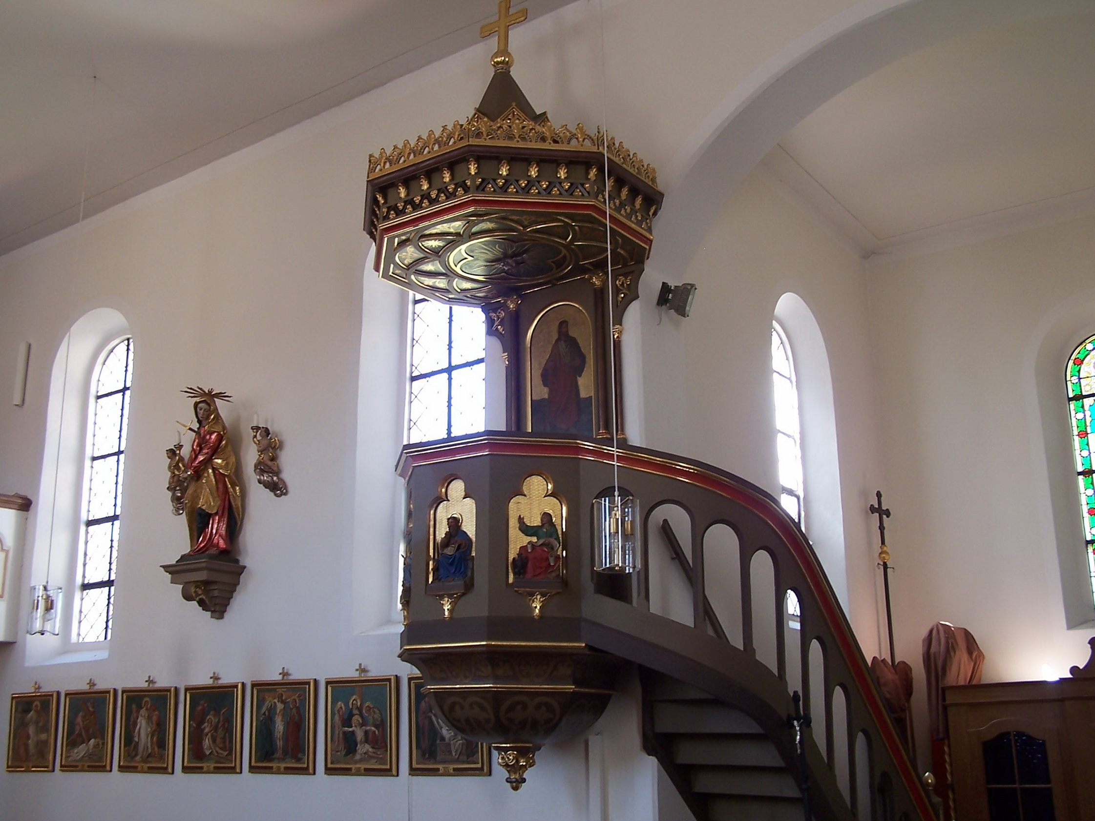 Furth in Niederbayern, Schatzhofen Nr. 14. Pfarrkirche St. Michael. Ploygone Kanzel mit Reliefs der vier Evangelisten in den Feldern.